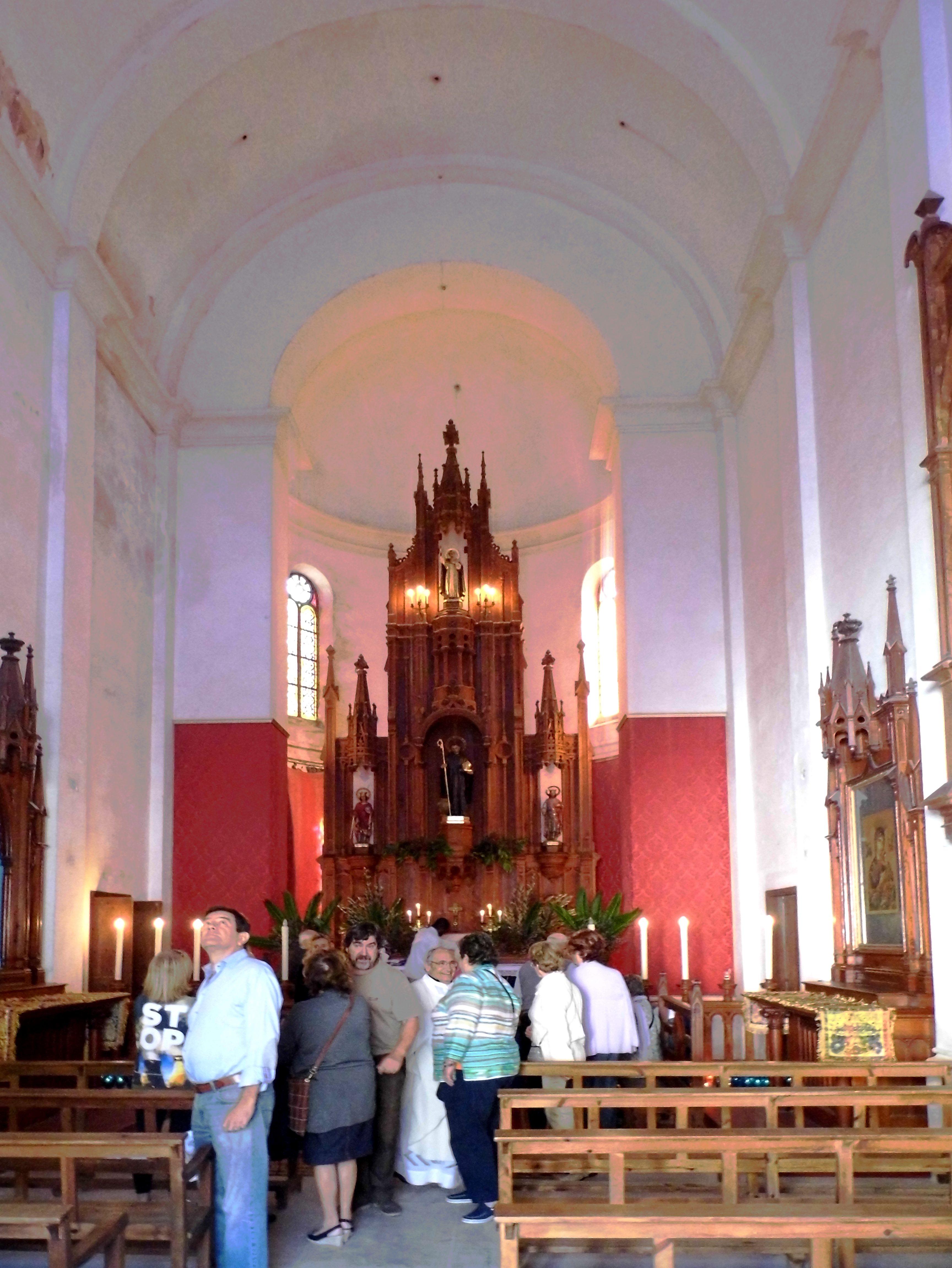 Ermita de Sant Grau, Kirche, Innen